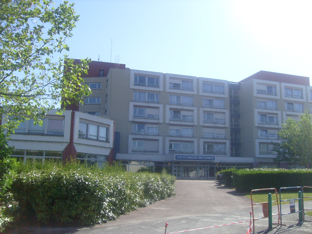 Polyclinique de Grande-Synthe, maternité de Dunkerque